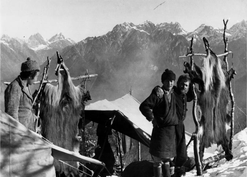 Schapilager, Aufstocken der Felle